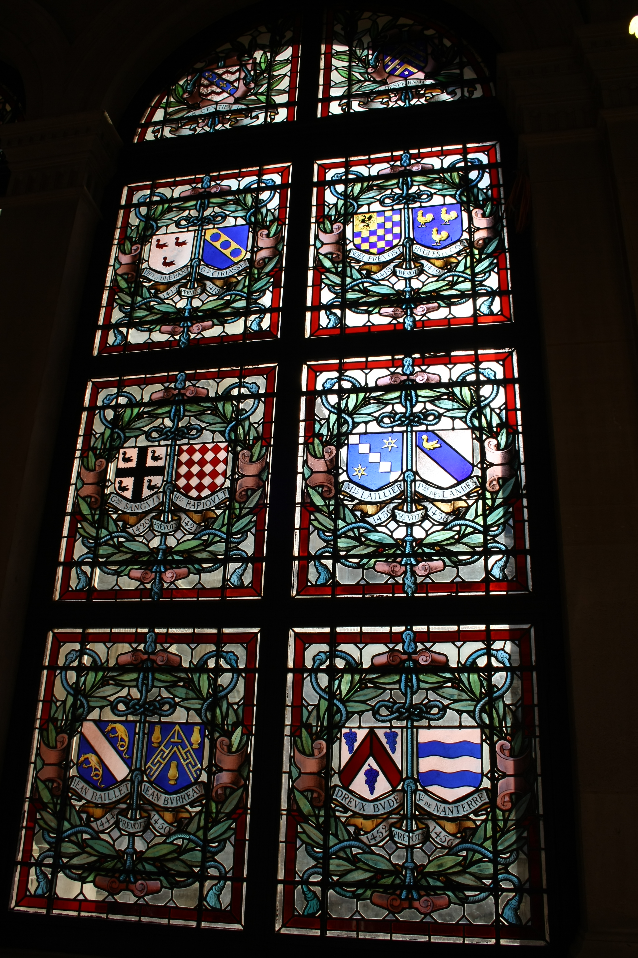 Bleiglasfenster im Rathaus von Paris (4. Arrondissement), "galerie du conseil", Darstellung: Wappen der Prévôt de Paris